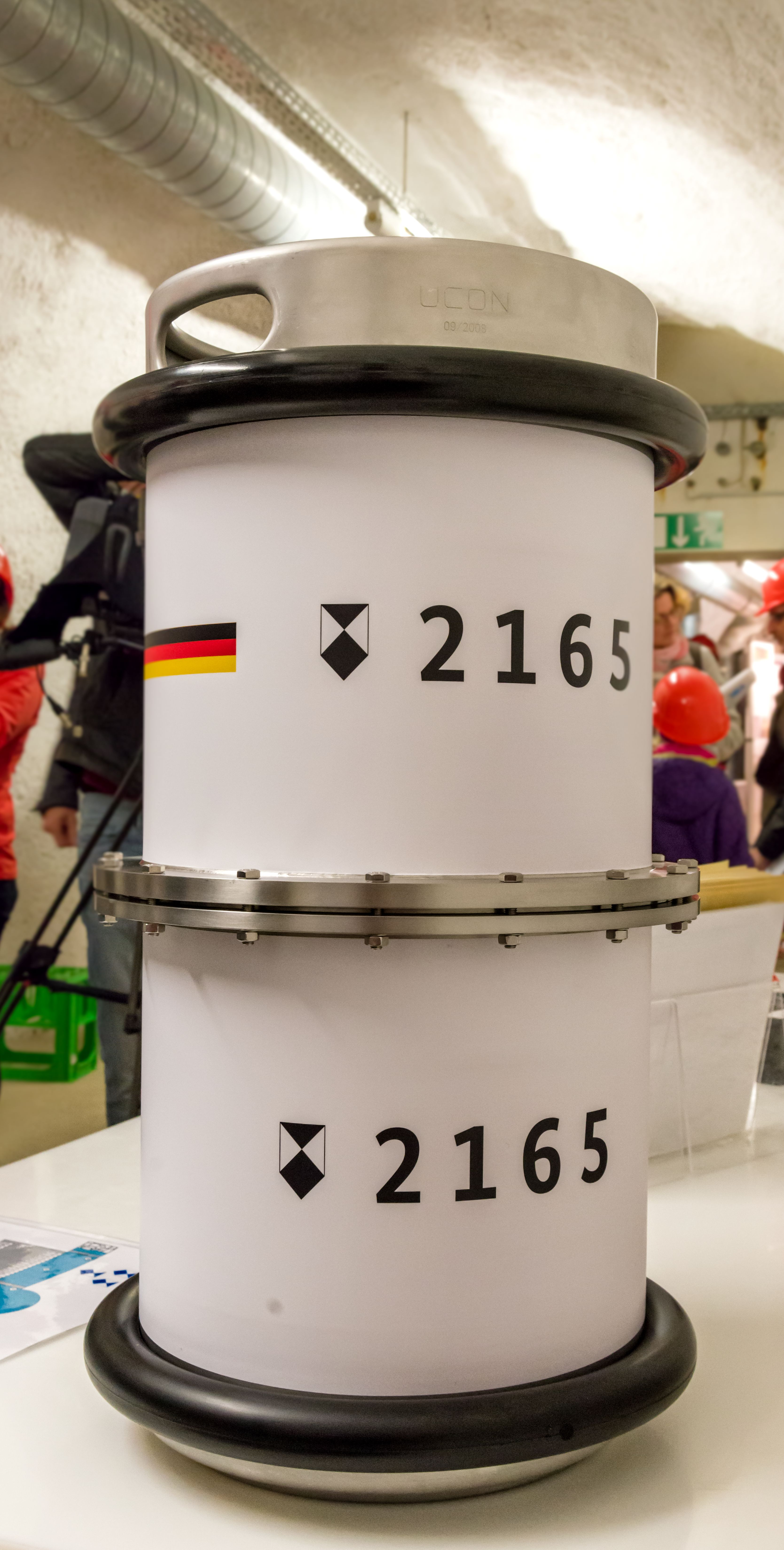 Die Einlagerung der Dokumente zum Grundgesetz und des Originals des "Grundgesetzes für die Bundesrepublik Deutschland" als Microfilm am 03. Oktober 2016. Das Grundgesetz ist das 1.000.000.000 Dokument (Bild) welches eingelagert wurde. Der Behälter 2165 mit dem Grundgesetz, dem 1.000.000.000 Bild der Archivs